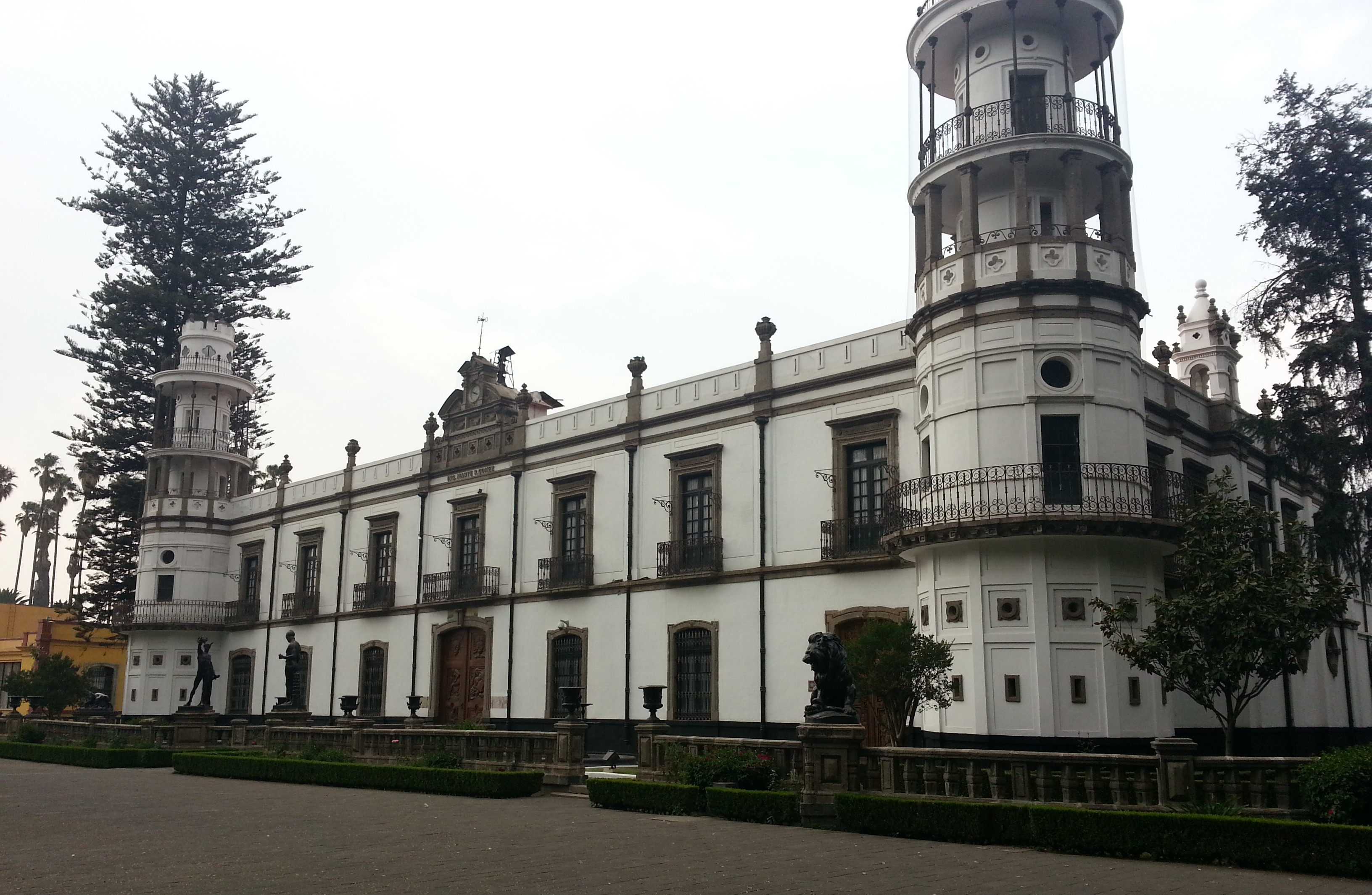 Foto de la Rectoría (Edificio Marte. R. Gómez) de la Universidad Autónoma Chapingo